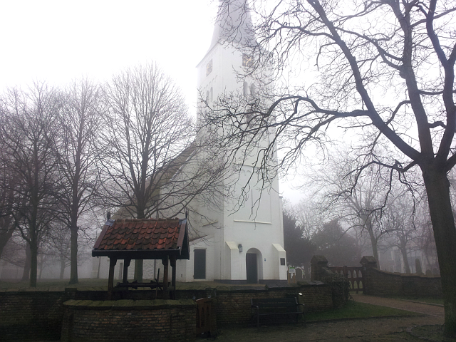 De Witte Kerk en de Willibrordusput ("het putje") in Heiloo zijn gehuld in dichte mist op vrijdag 2 maart 2012. Een uniek, sprookjesachtig gezicht in het centrum van het dorp.